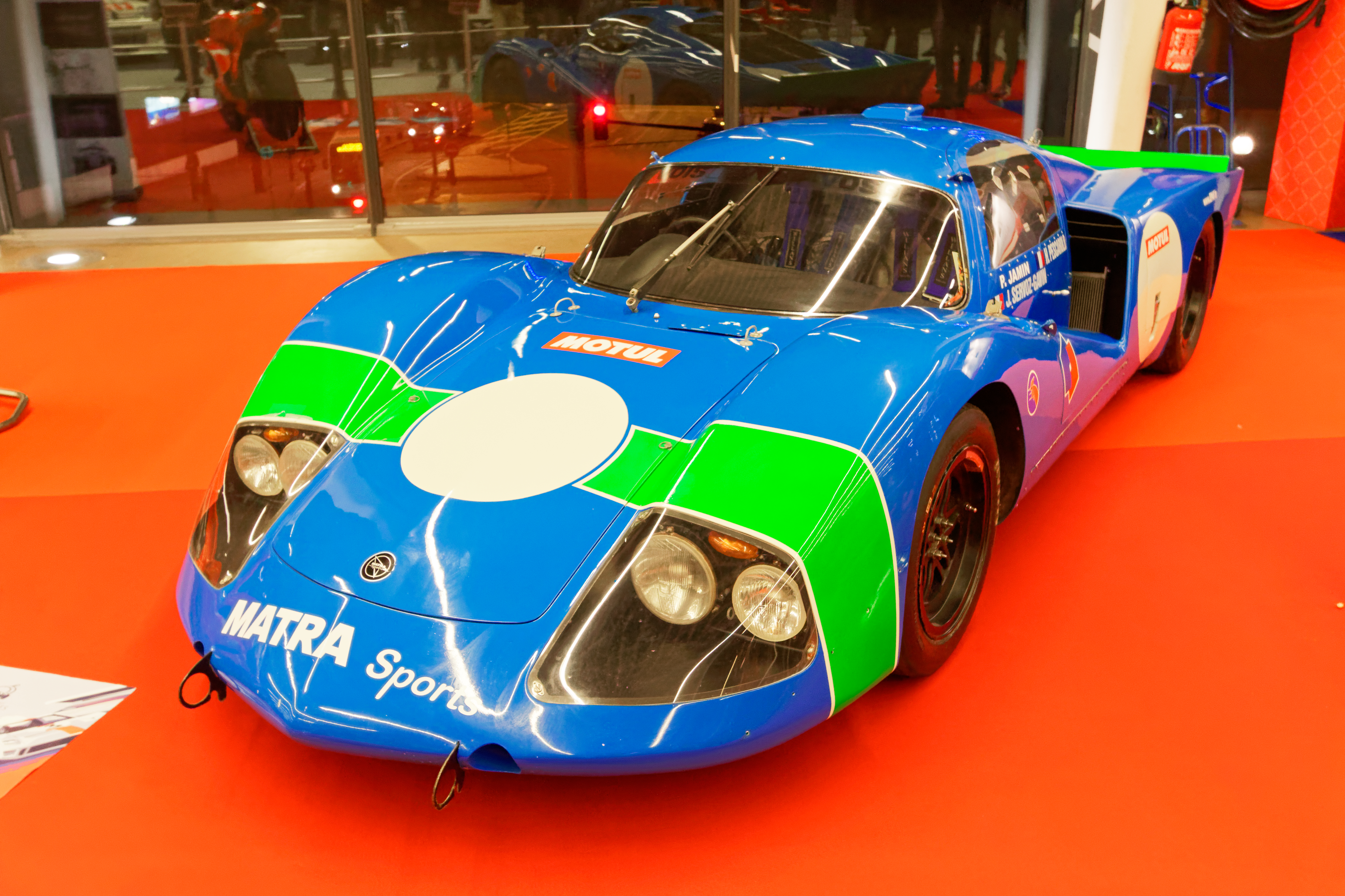 Une Matra MS 630-06 de 1967 exposée lors du salon Rétromobile 2017.